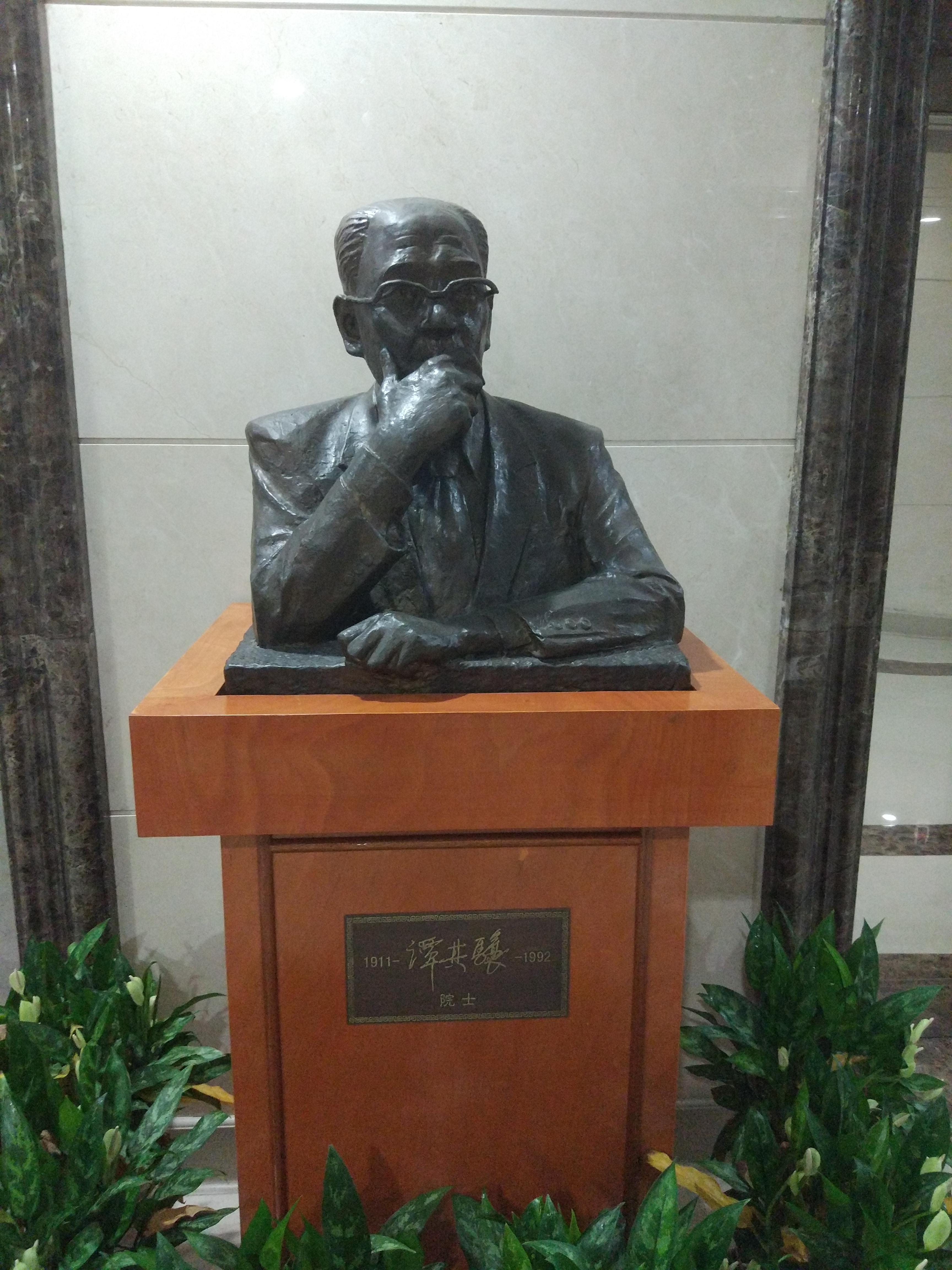 谭其骧像，位于复旦大学中国历史地理研究所，光华楼201层电梯井，摄于2017年7月。